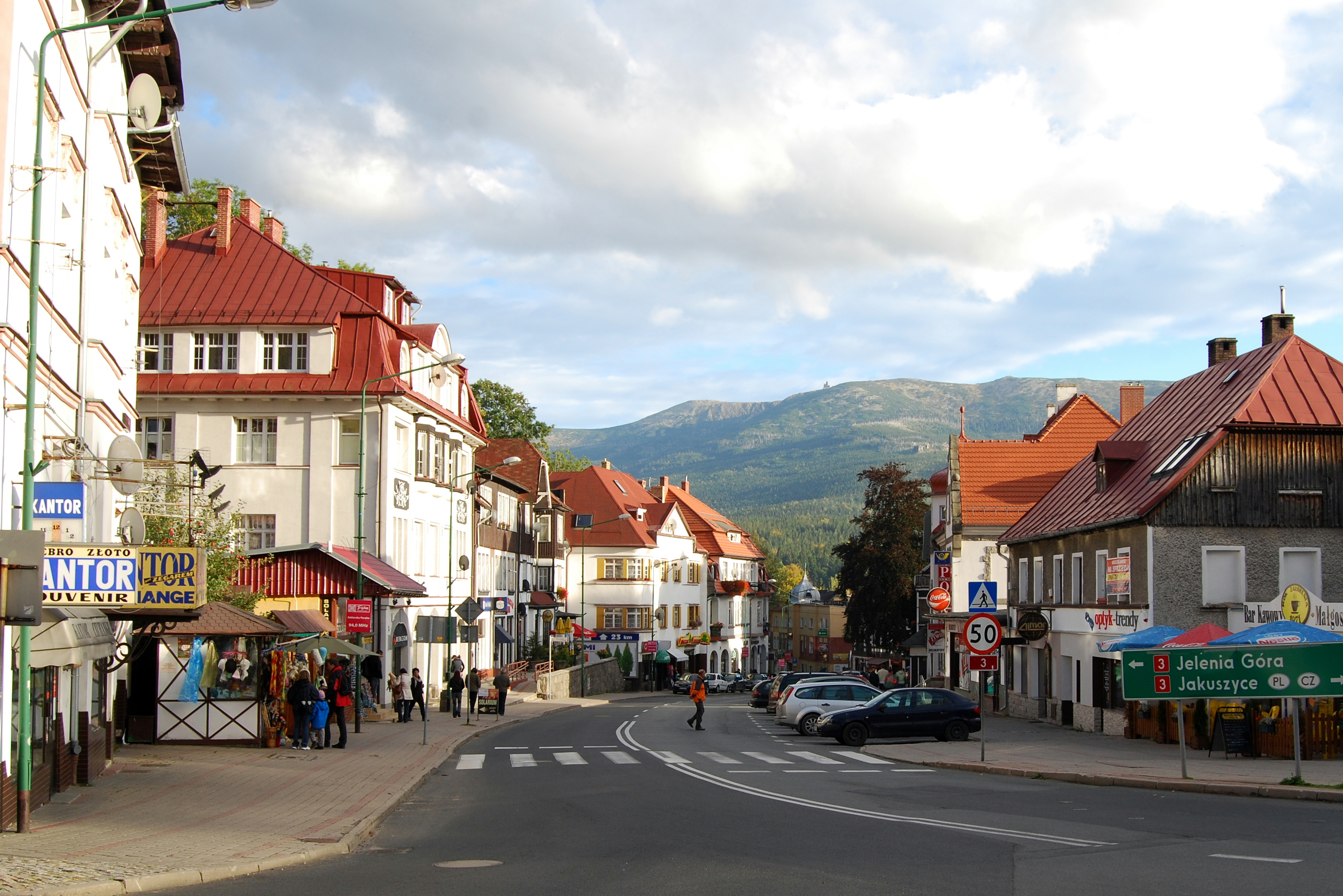 Miasto, Szklarska Poręba 26.02.80.